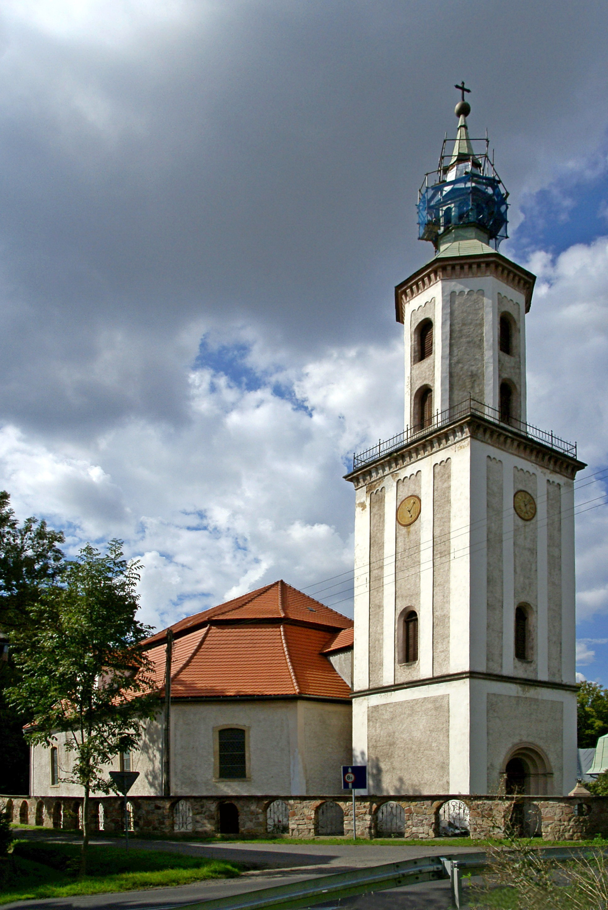 Kościół pw. Matki Boskiej Różańcowej we wsi Nowy Kościół, powiat złotoryjski.